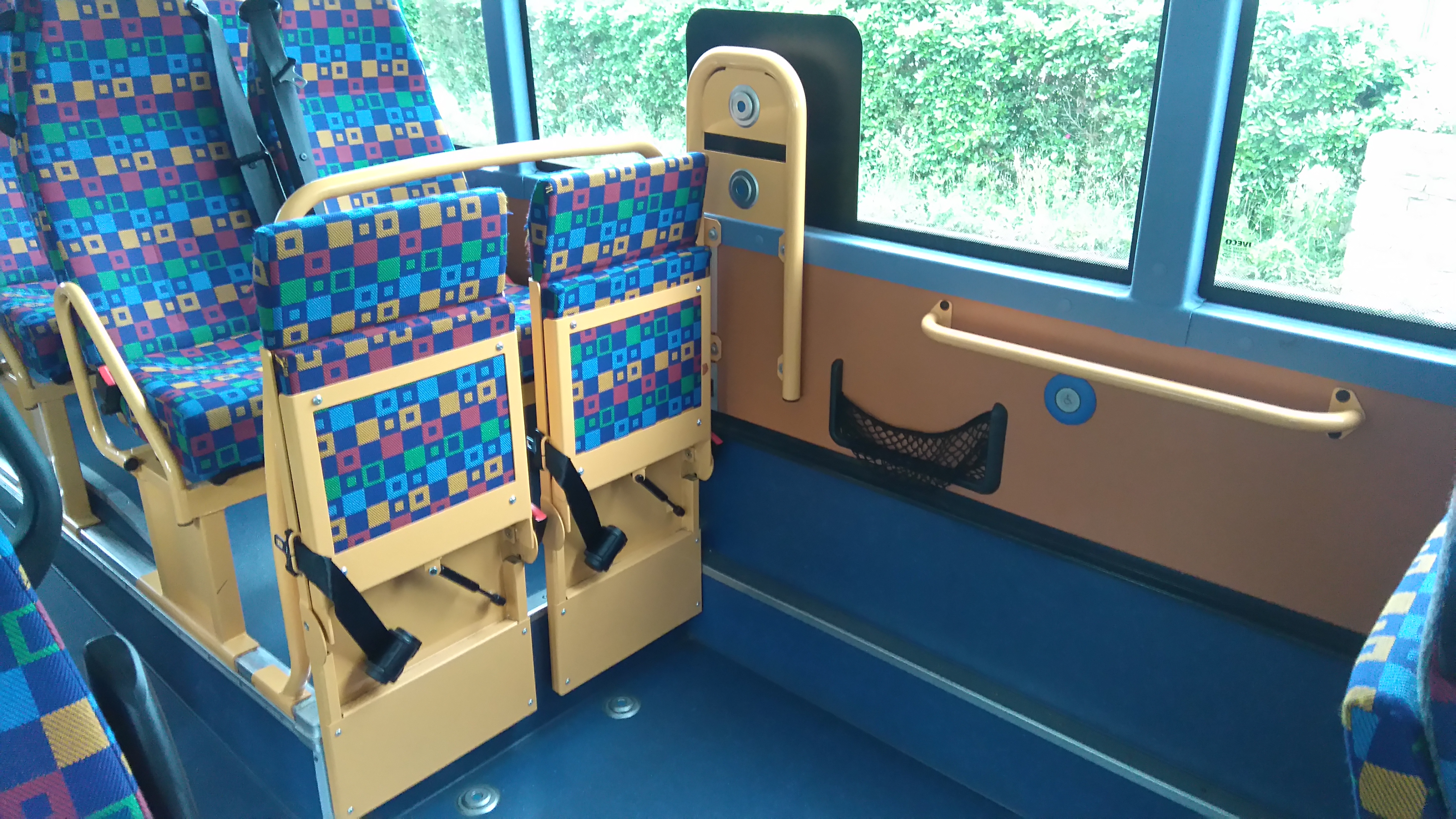 Irisbus Récréo 12,80m - Strapontin